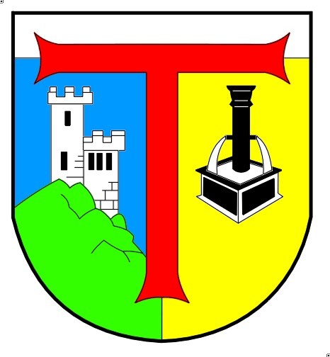 Gemeindewappen von Törbel